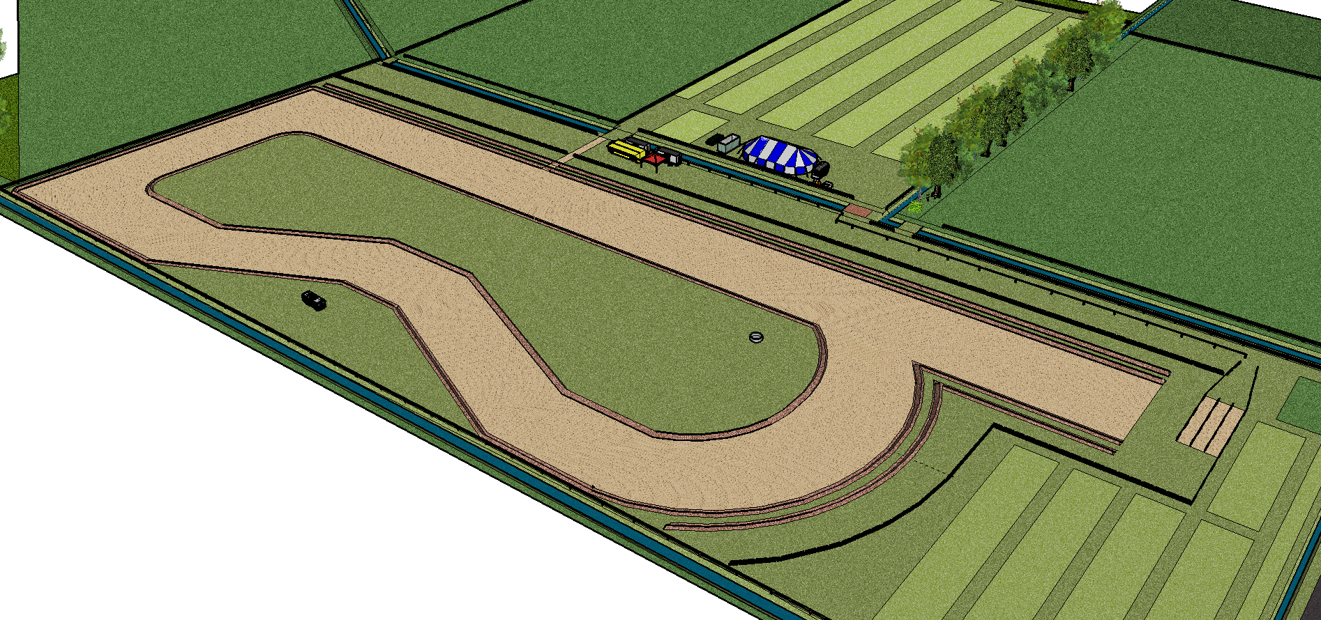 Bovenaanzicht van een autocrosbaan